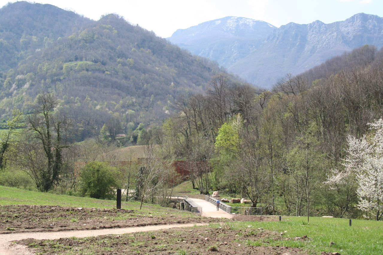 Situación del museo de la prehistoria de Asturias